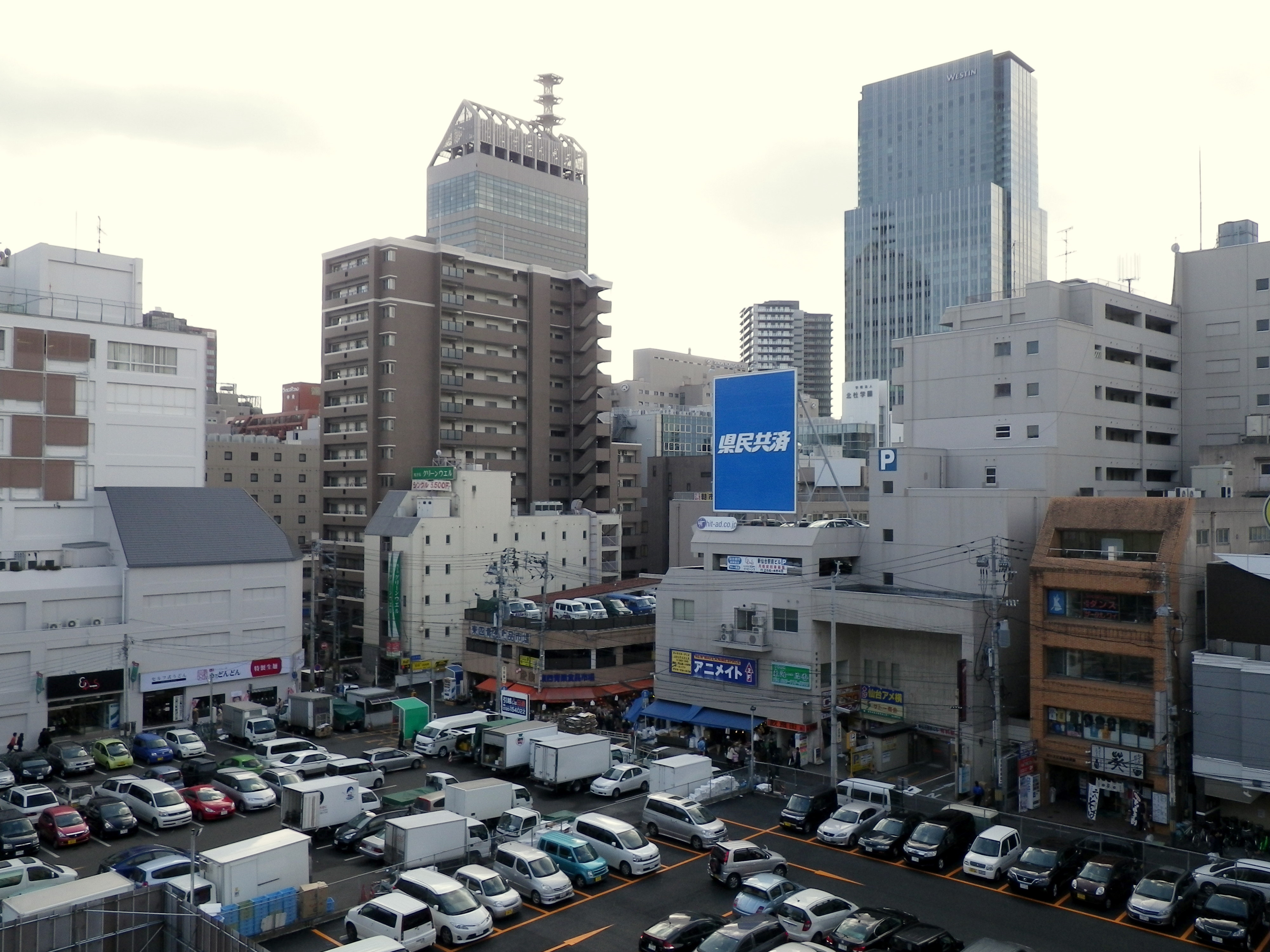 北東側から見た仙台朝市とその周辺